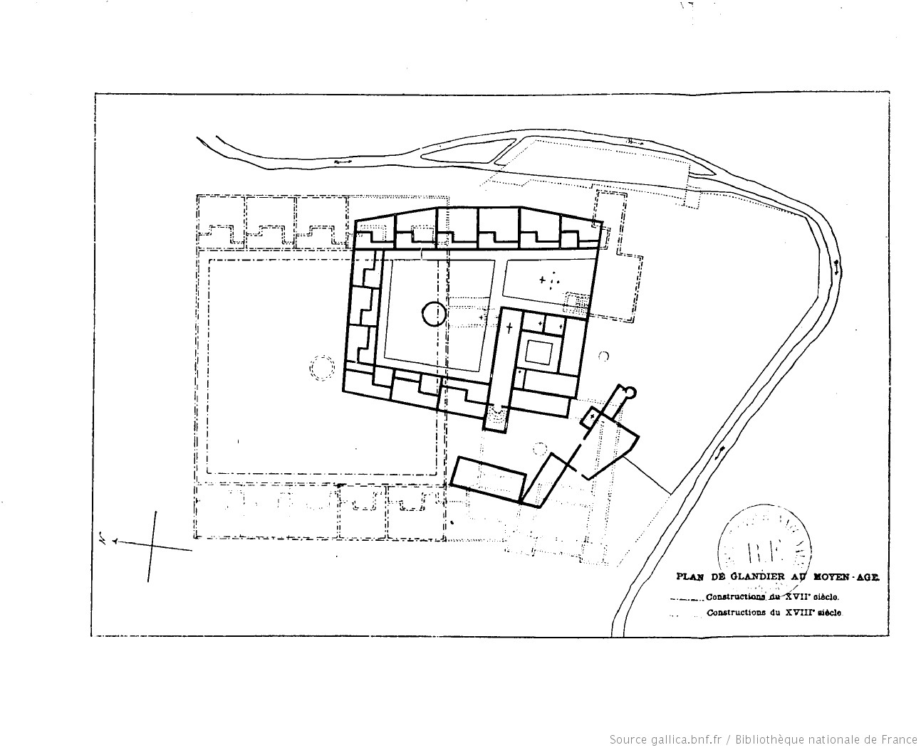 Plan de Glandier au Moyen âge (gravure de 1886)